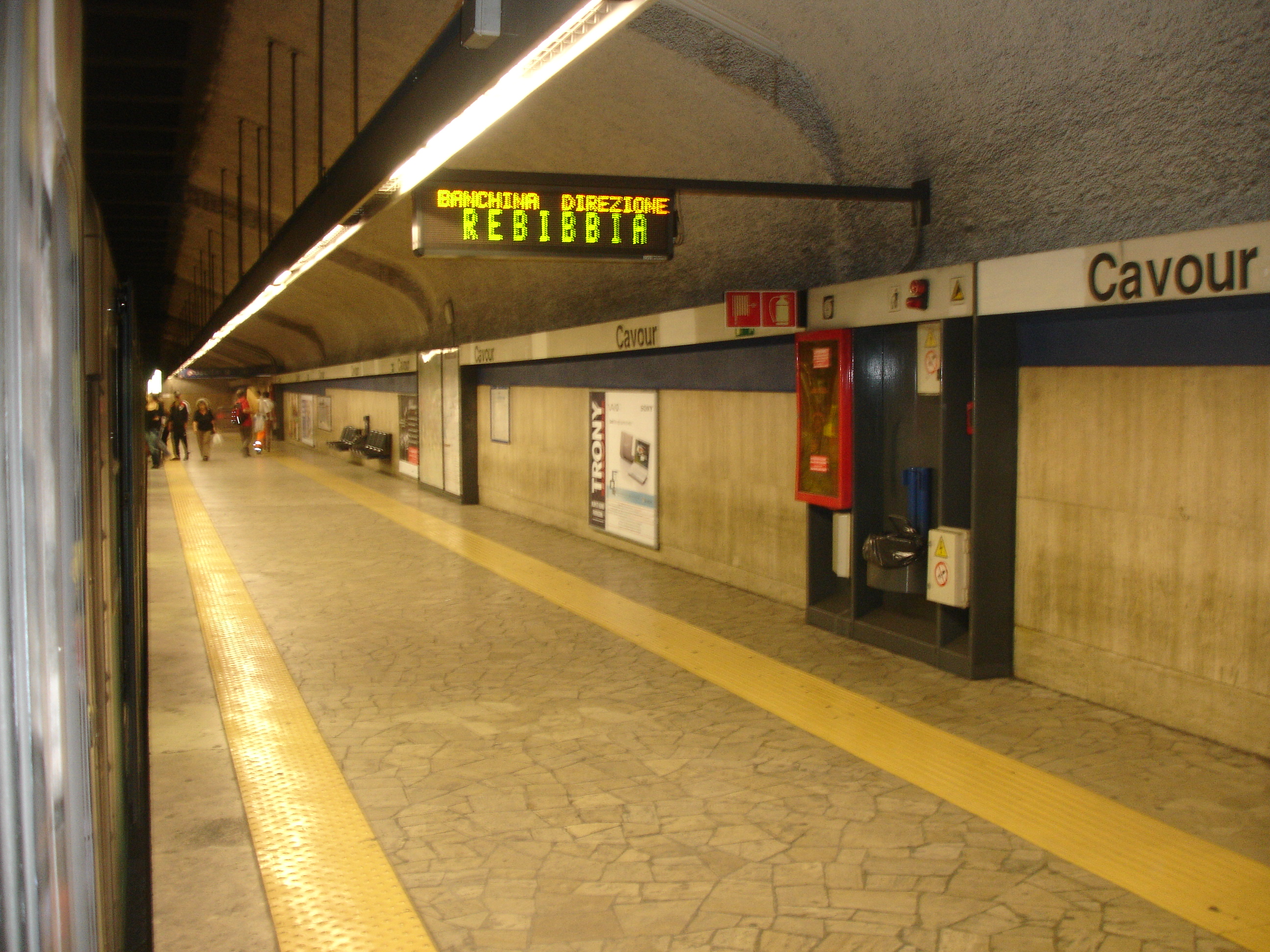 Uno scorcio della stazione Cavour.